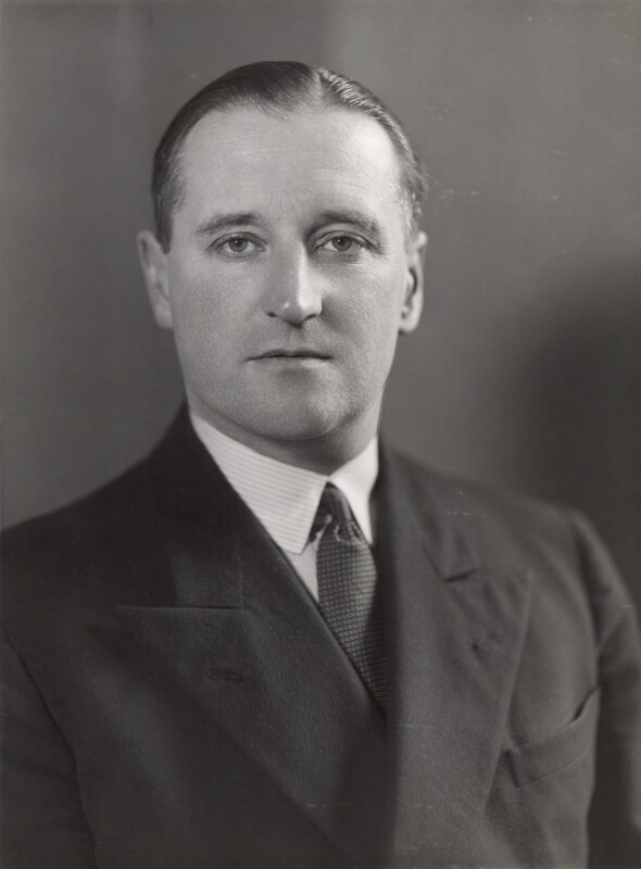 Robert Bower